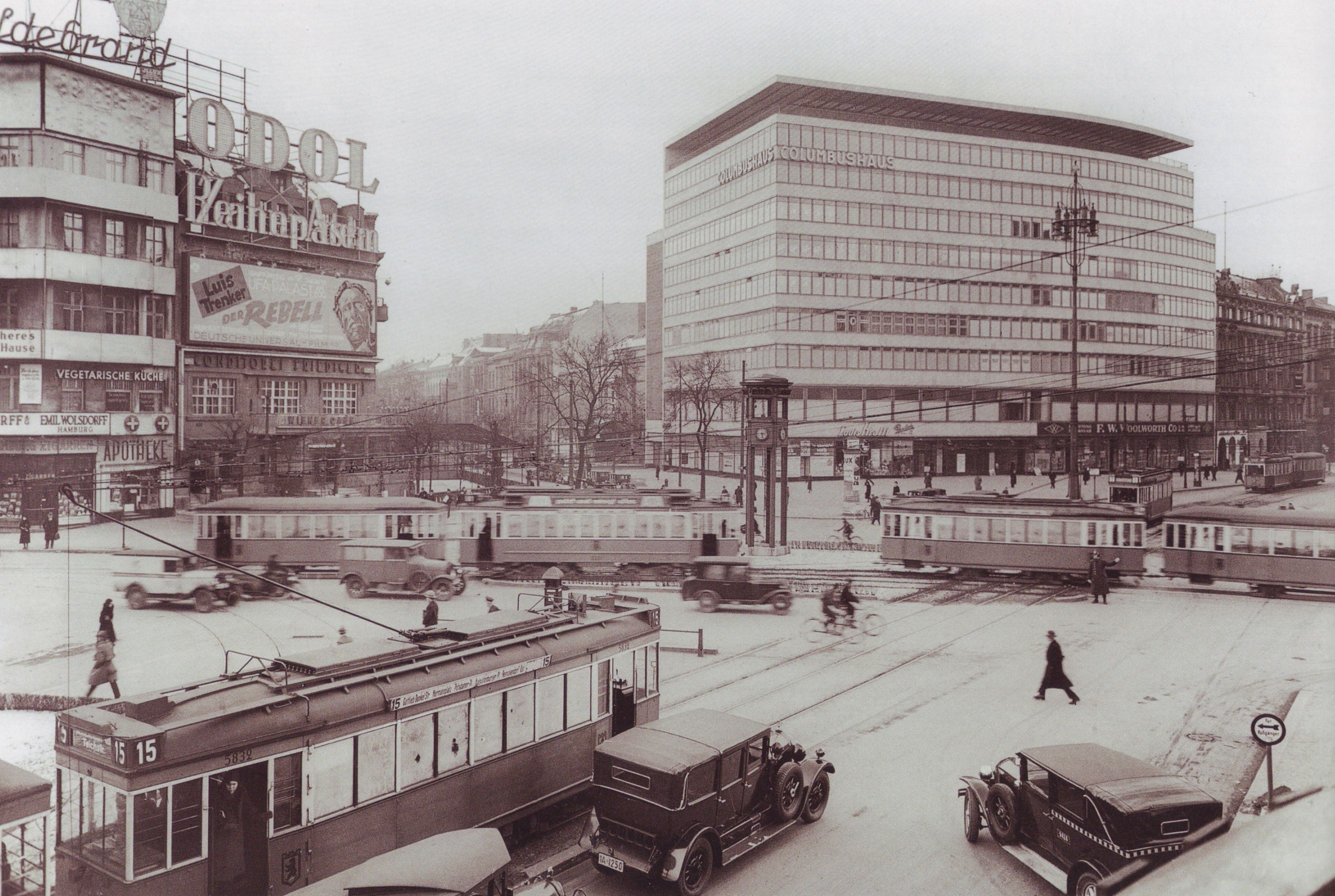 Berlin. Potsdamer Platz mit Columbushaus. Über der Konditorei Friediger (bis 1930 Cafe Josty) wird für den Film Der Rebell von Luis Trenker geworben, der am 22. Dezember 1932 in Stuttgart uraufgeführt wurde.